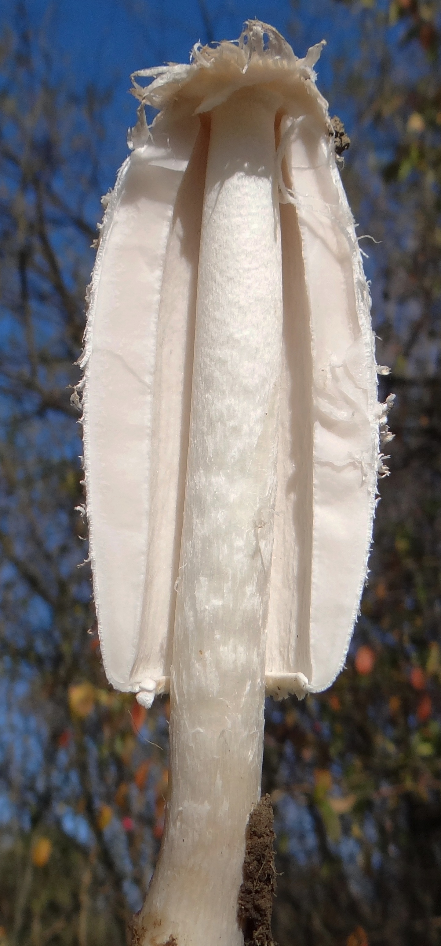 Coprinus comatus